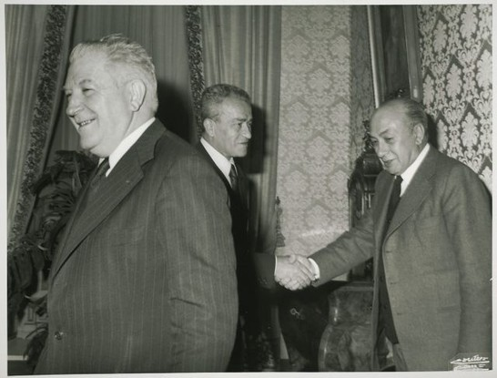 Il presidente della Camera dei Deputati Pietro Ingrao riceve il presidente del Parlamento Europeo Georges Spénale